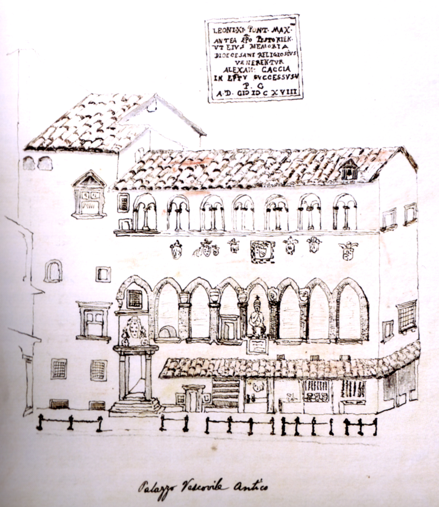 Fondo chiappelli, palazzo vescovile antico di pistoia, 1625